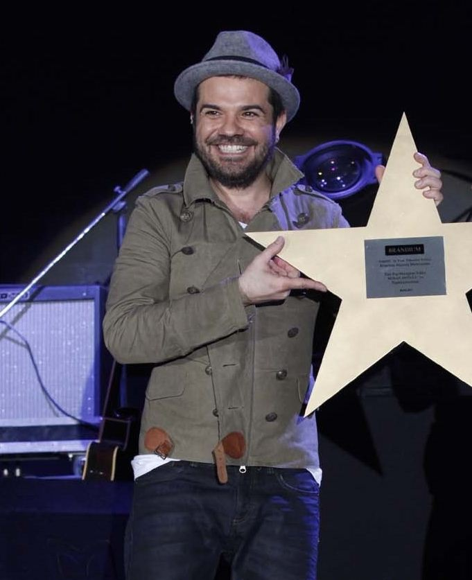 Kenan Doğulu'nun 2013 de verdiği konser sırasında kendi çektiğim bir fotoğrafır.